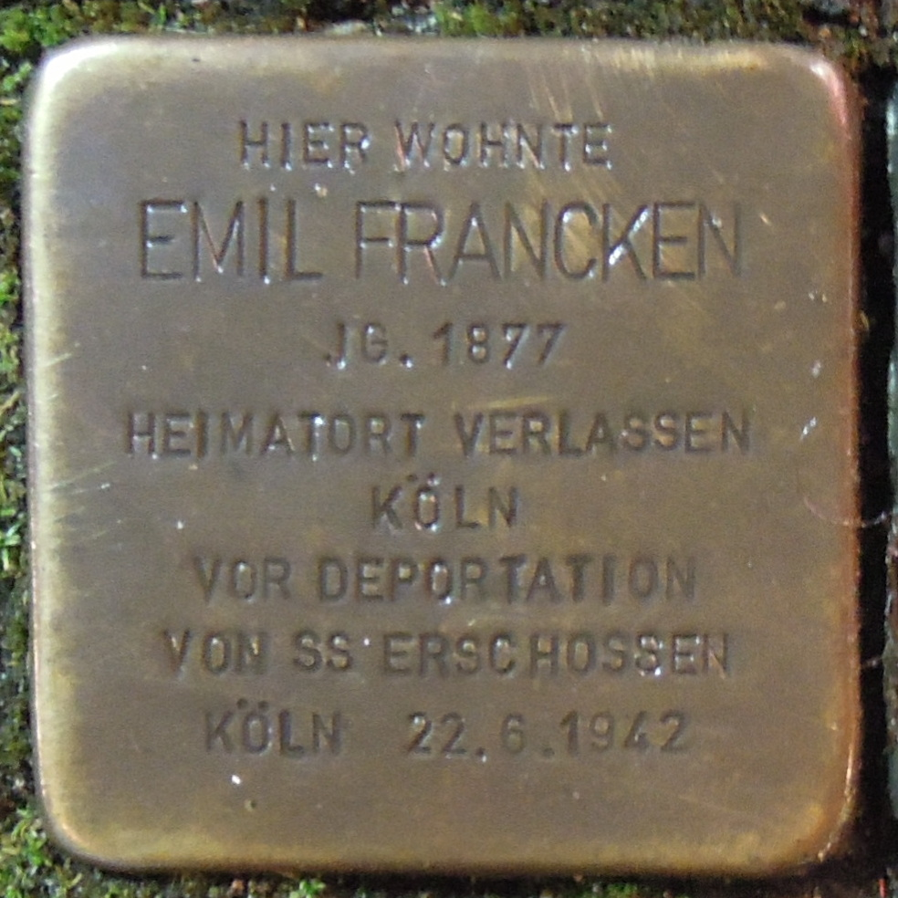 Stolperstein Geldern Issumer Straße 1 Emil Francken